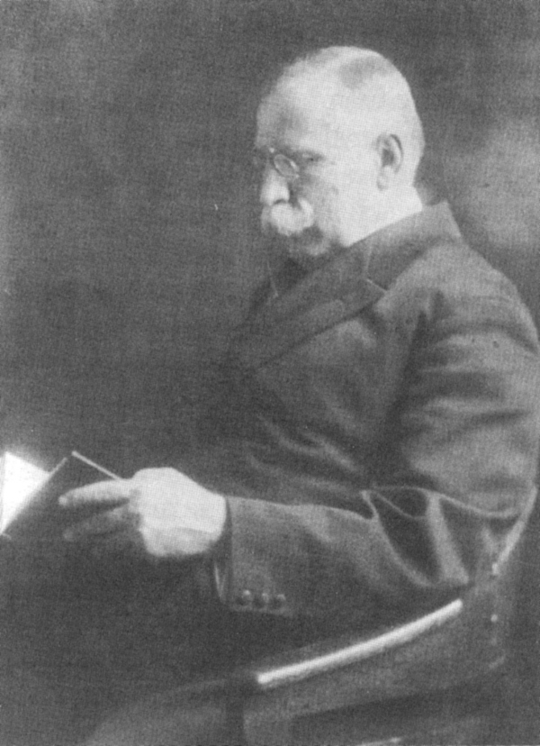 Димитър Тончев (1859-1937) в Берлин